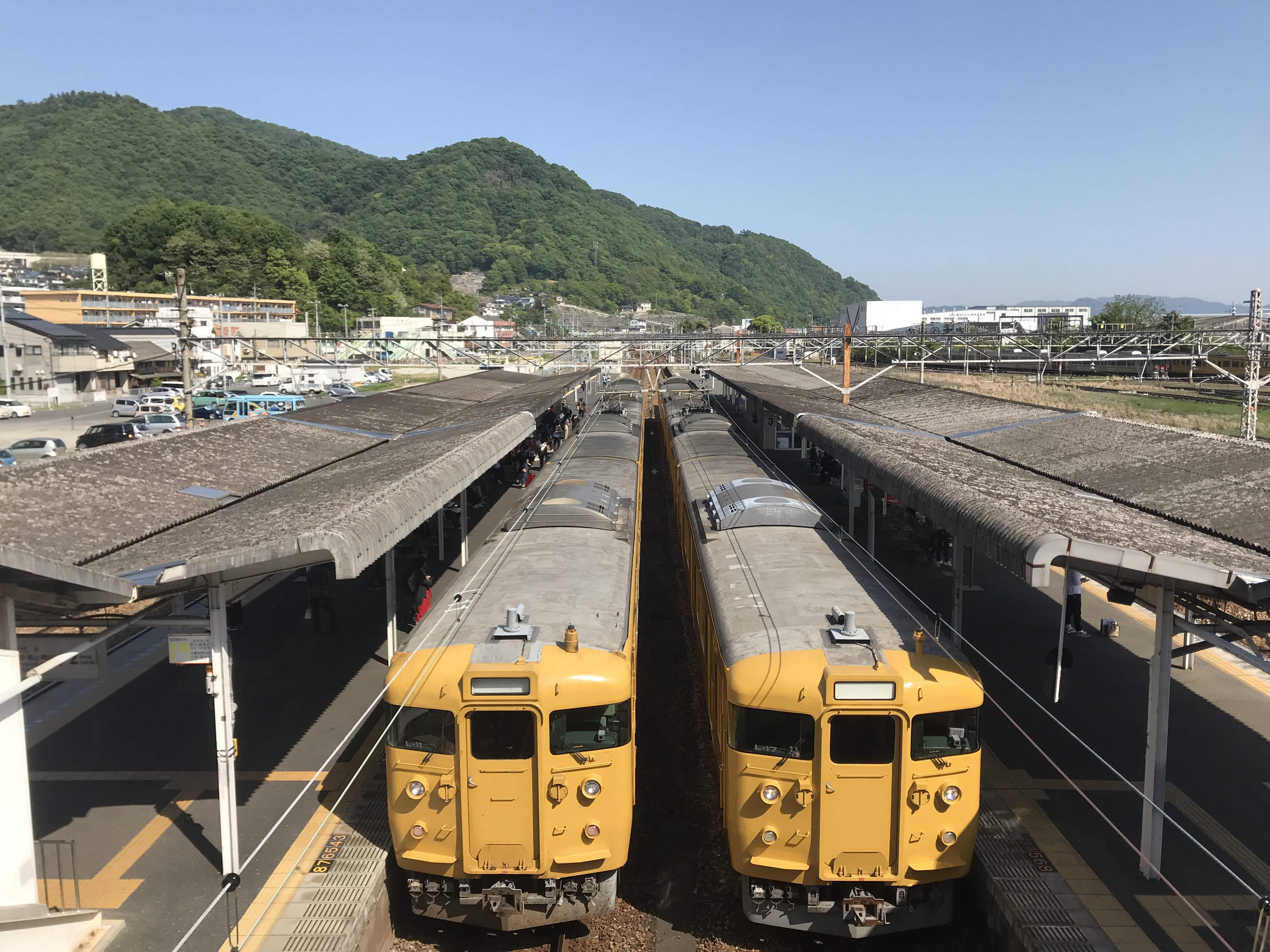 糸崎駅の跨線橋より望む駅構内(奥は尾道方面)